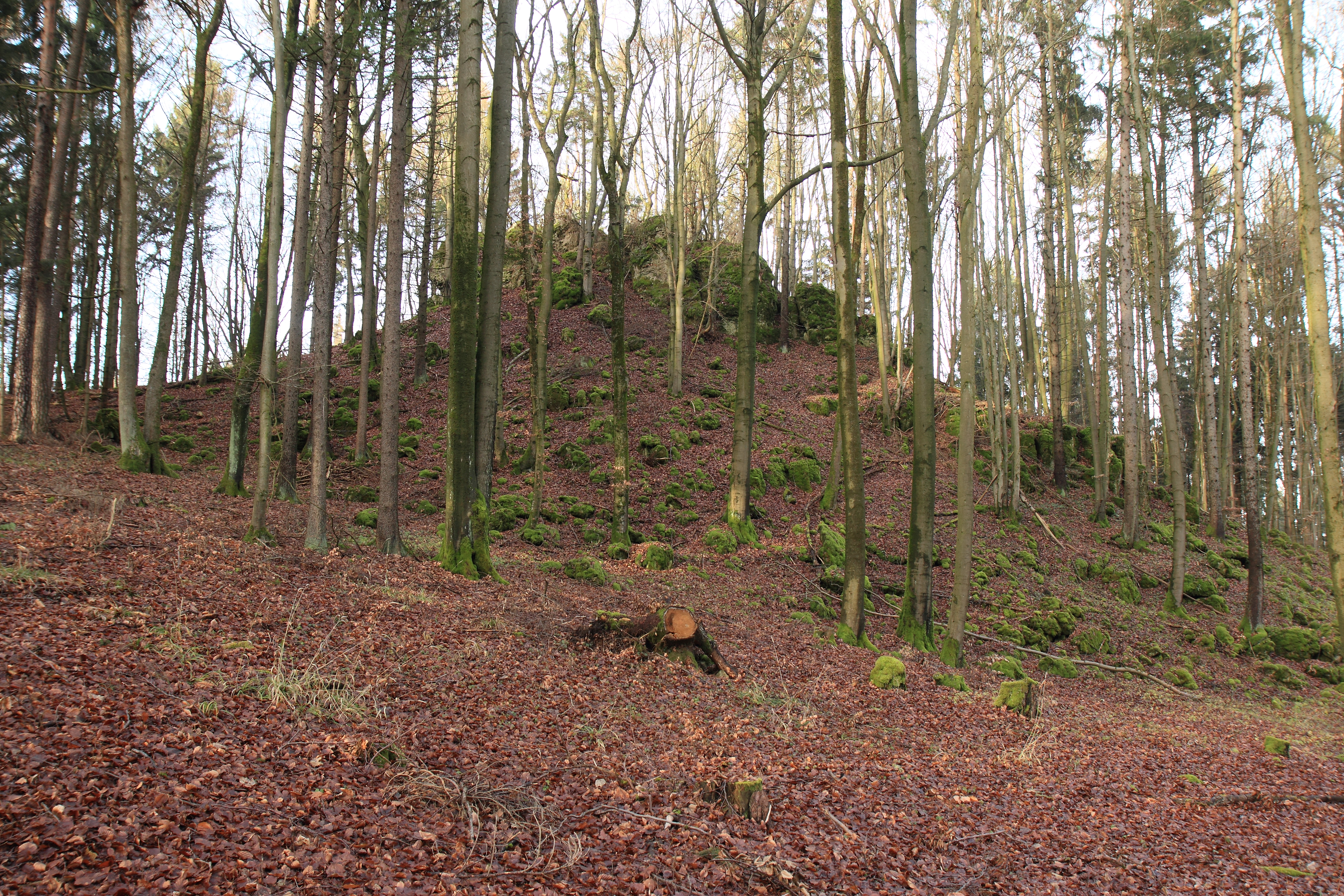 Stieglerfelsen auf dem Mayersberg bei Hörmannsdorf